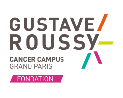 Logo de la Fondation Gustave Roussy